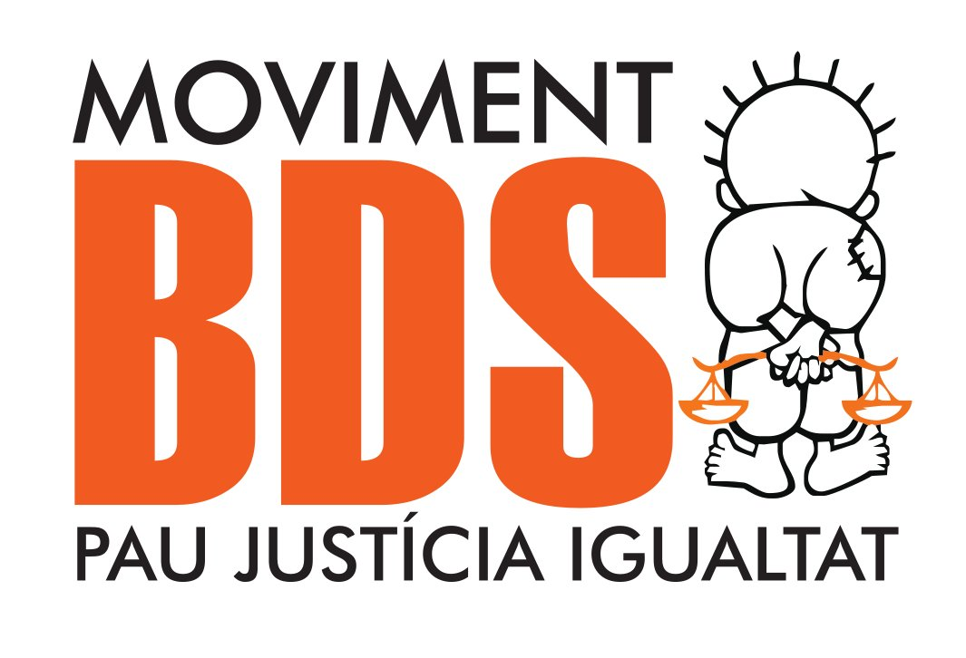 Formació: 9 de Juliol de 2005 Tipus: Organització sense ànim de lucre Propòsit: Boicot, Activisme Polític, Moviment Social Pàgines Web: Internacional: Espanya: Catalunya